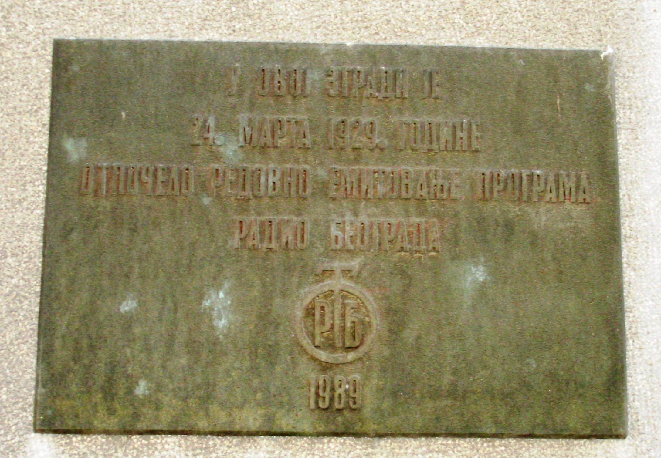 Tabla na zgradi odakle je prvi put emitovan program Radio Beograda. Slikao Goldfinger